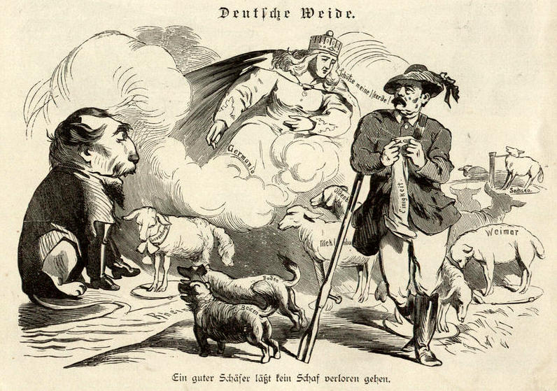 Bismarck-Album des Kladderadatsch. "Deutsche Weide." Karikatur auf die Situation nach dem Deutschen Krieg: Bismarck als Schäfer wird von Germania aufgefordert, ihre Herde (die deutschen Kleinstaaten) zu schützen. Jenseits des Rheins sitzt als Löwe Napoleon III. mit Blick auf das Schaf Luxemburg, worauf Germania mit einer Geste hindeutet.